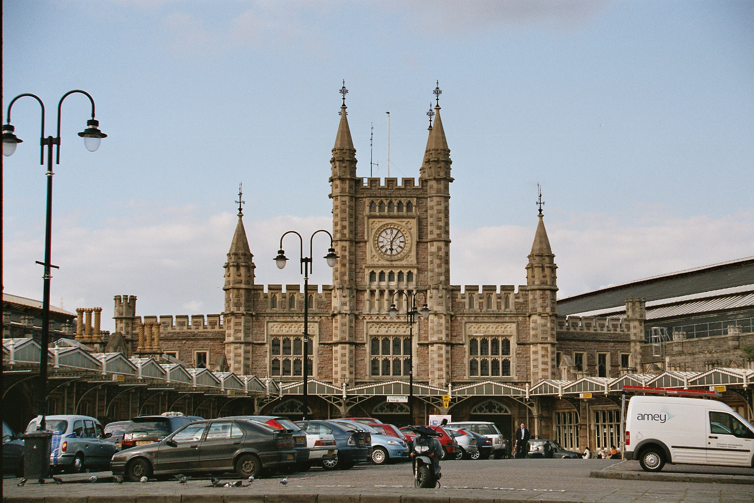 Bristol Temple Meads. Hauptbahnhof von Bristol, England, Vereinigtes Königreich.